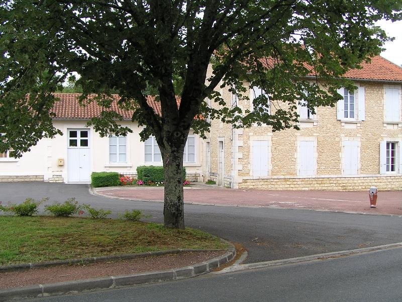 place de Richemont (mairie,école)